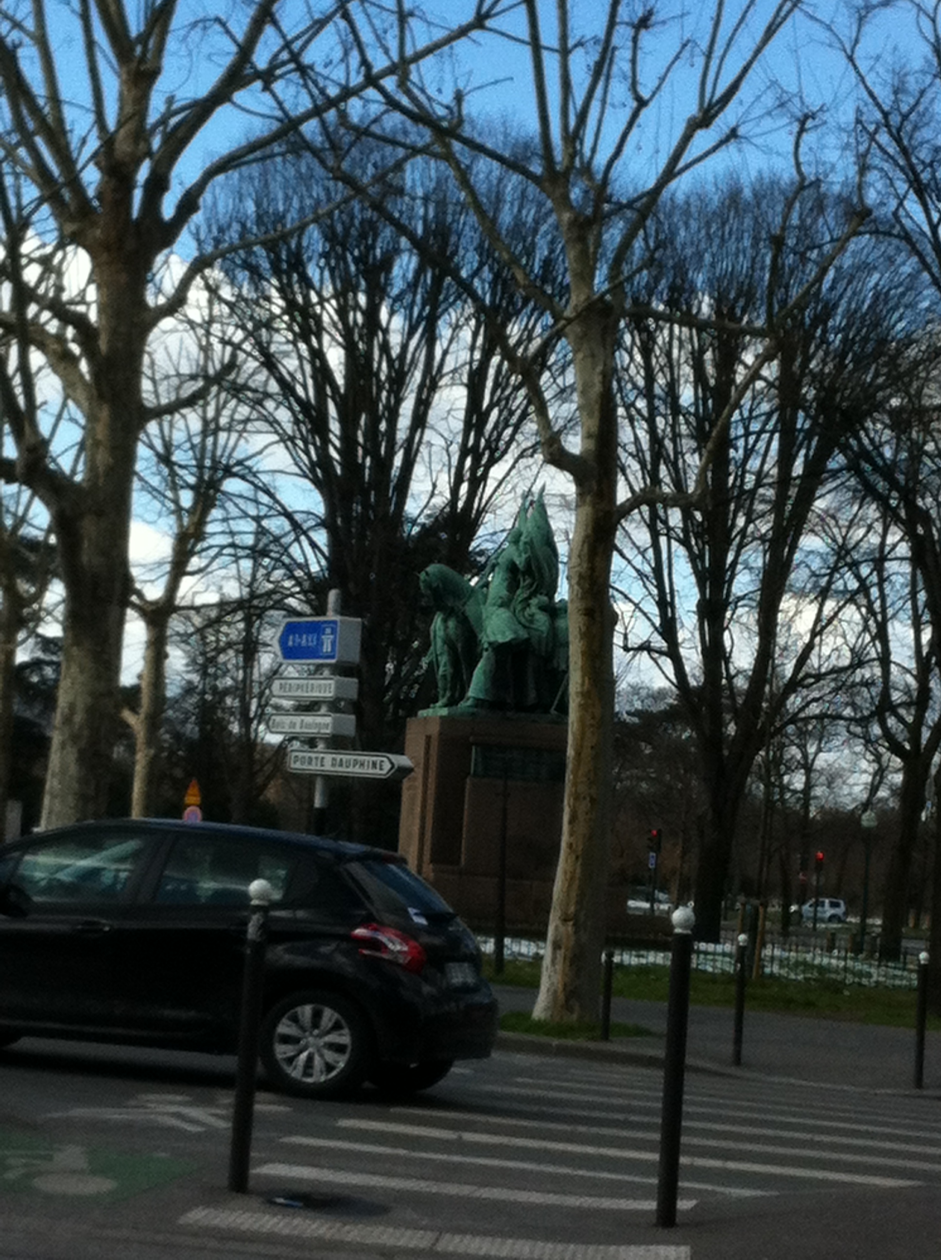 Muette, paris FR